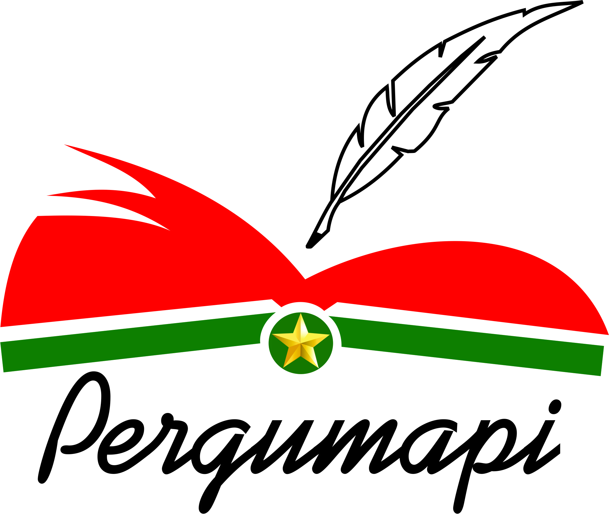 Logo Perkumpulan Guru Madrasah Penulis atau Pergumapi